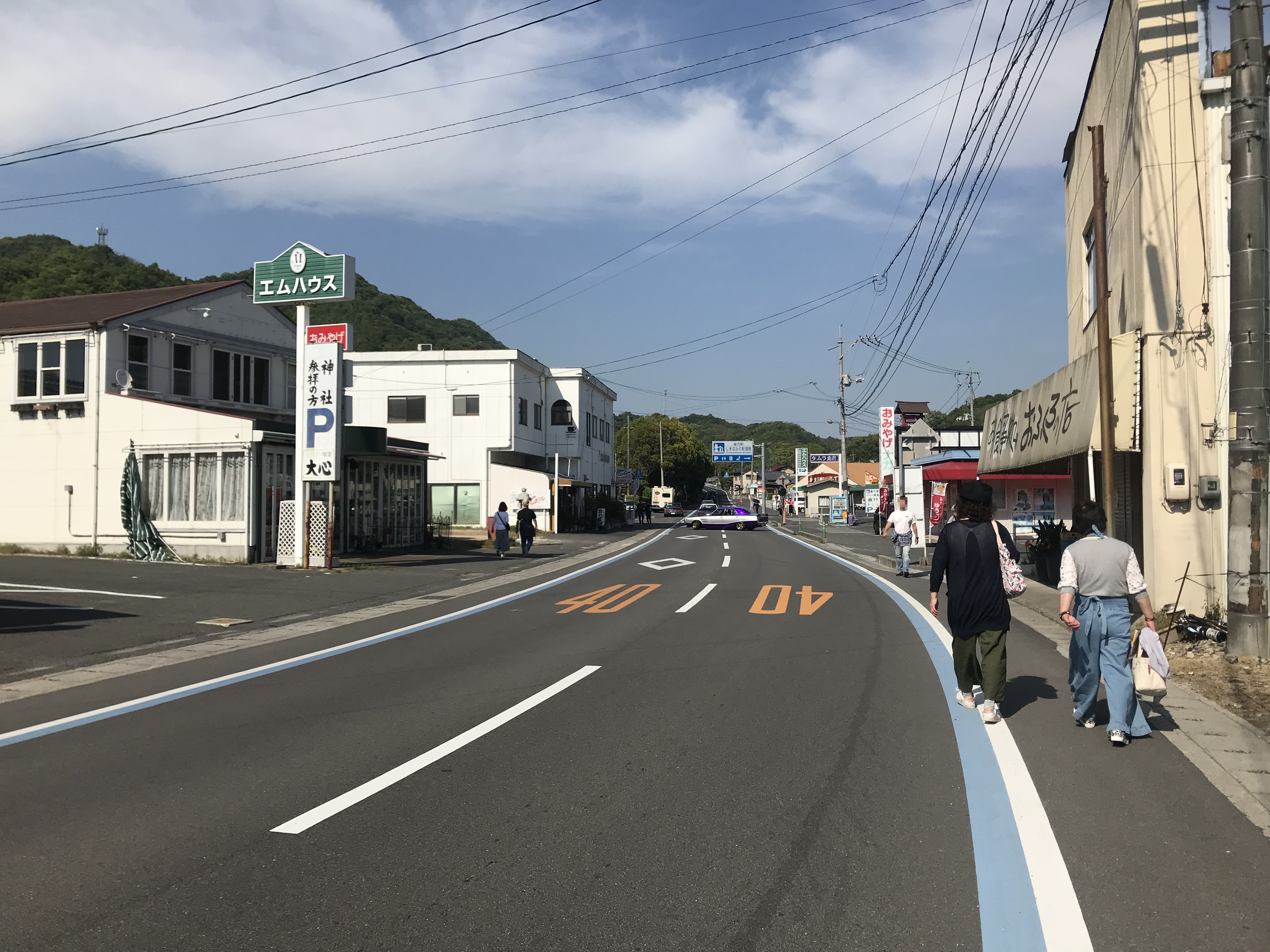 道の駅しまなみの駅御島付近の愛媛県道21号